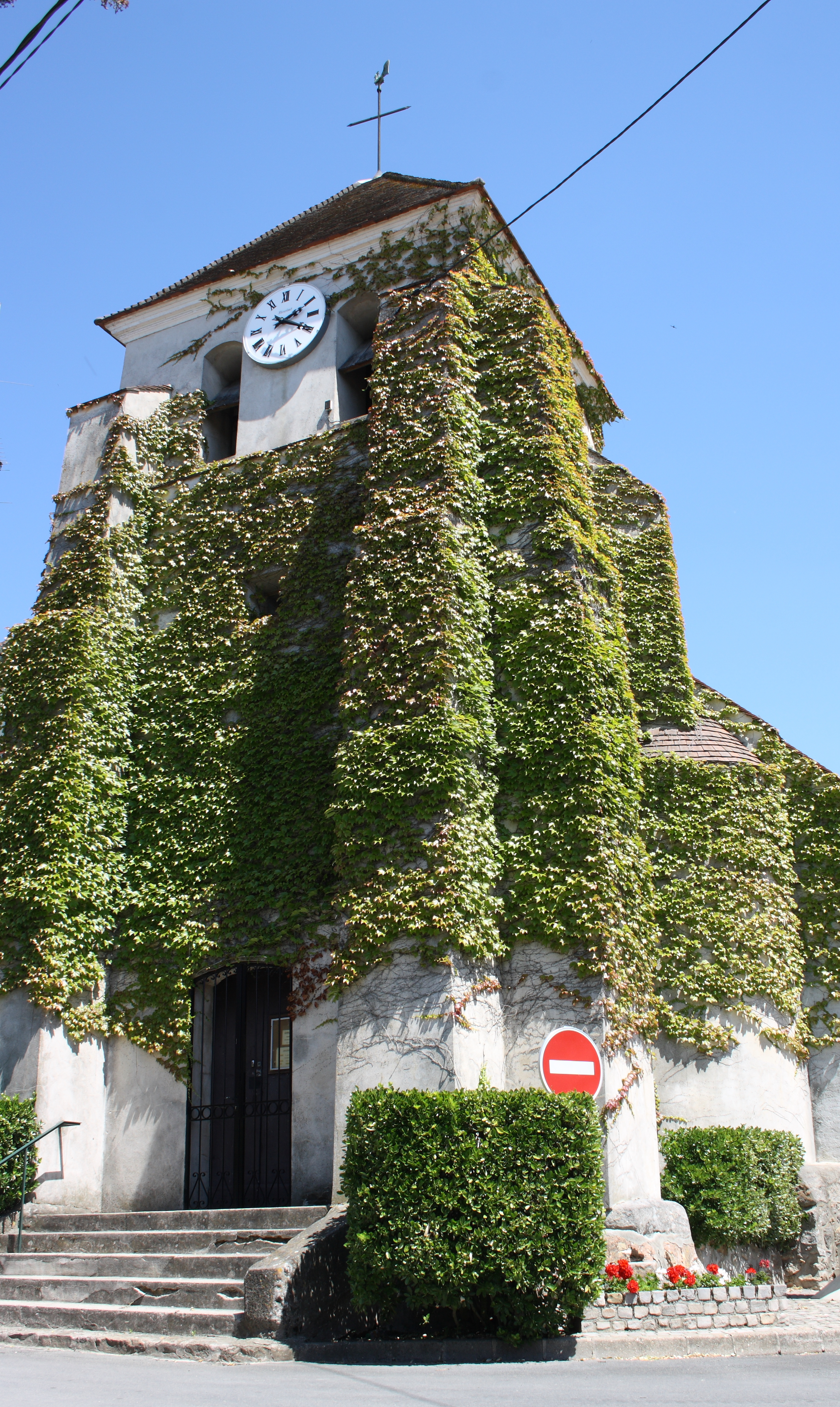 katholische Kirche Saint-Germain in Armentières-en-Brie